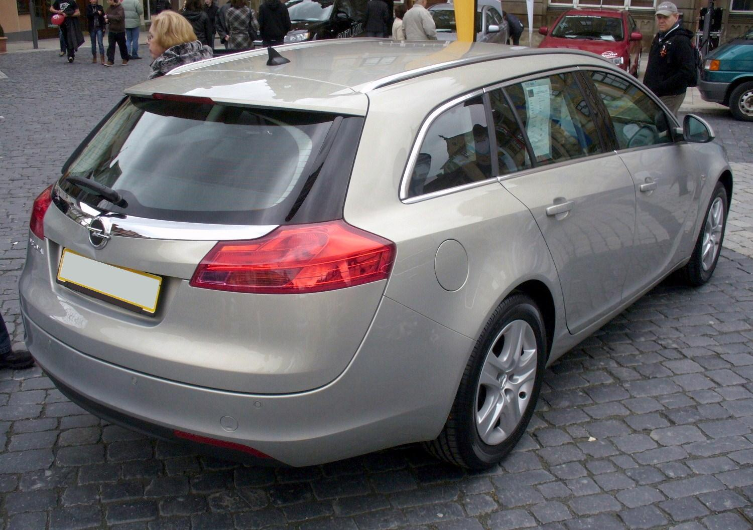 Opel Insignia Sportstourer